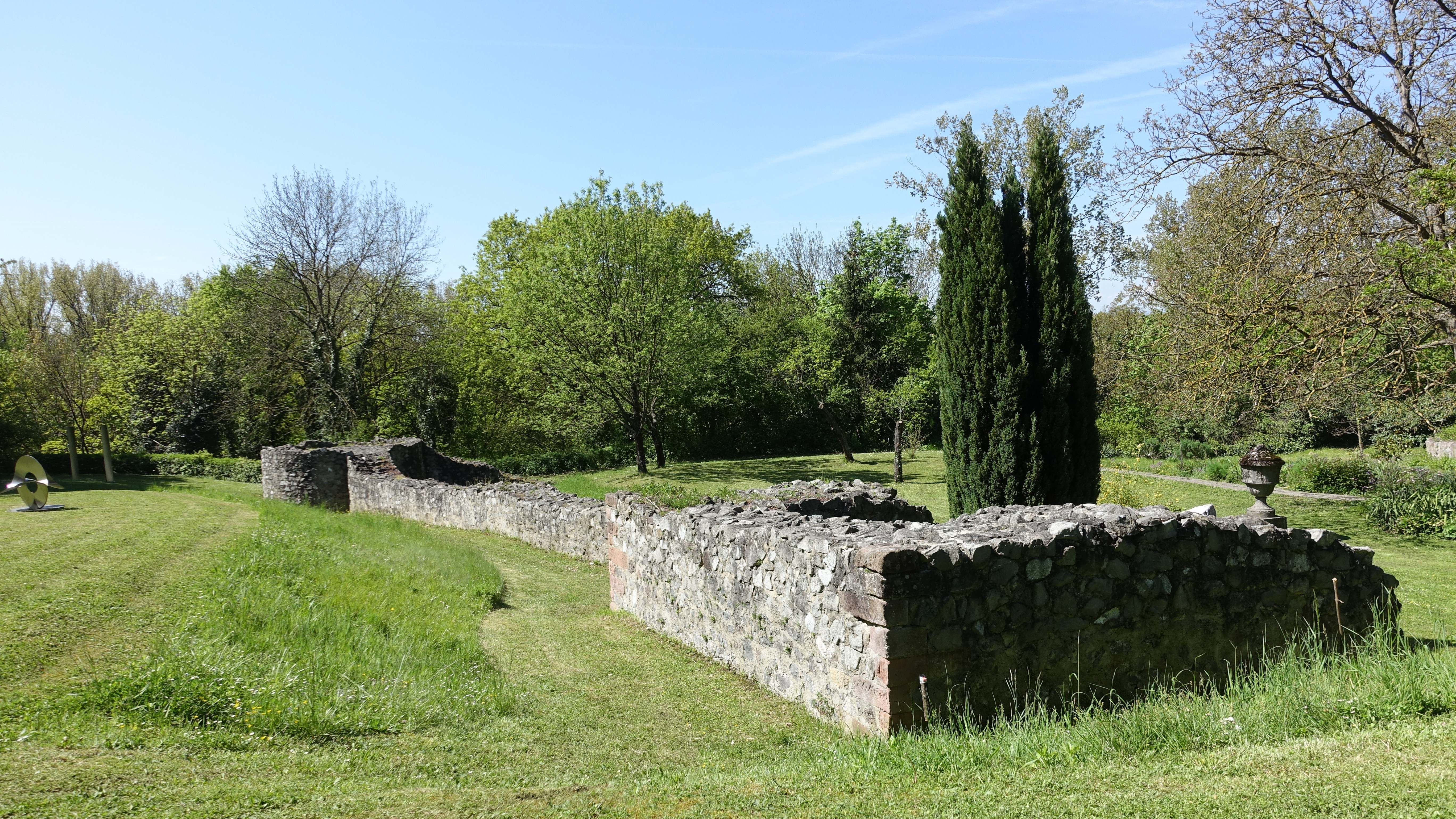 Sasbach am Kaiserstuhl - Burg Sponeck, Mauerreste des spätrömischen Kastells